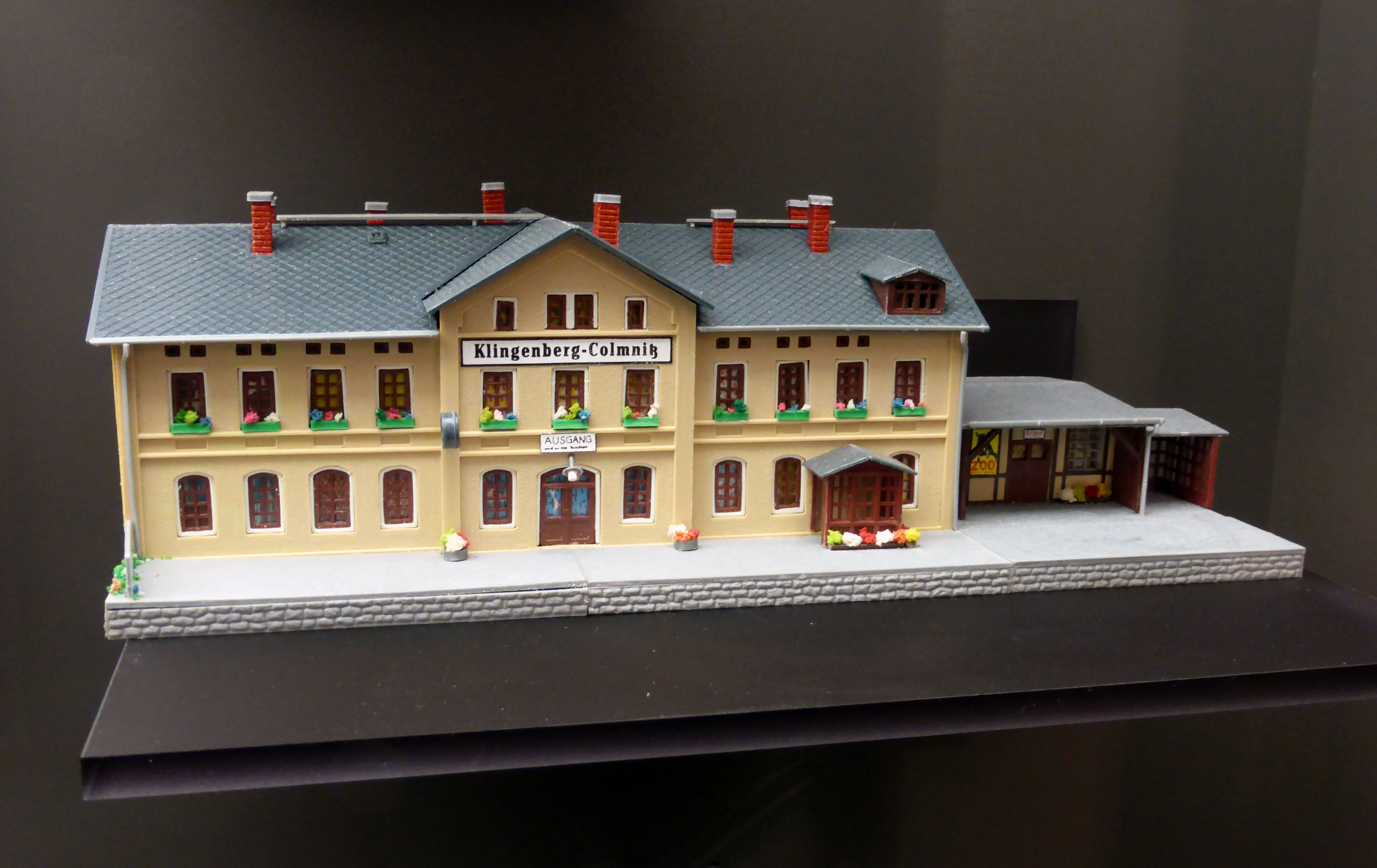 Mamos-Bausatz: Bahnhof Klingenberg-Colmnitz. Ausgestellt im Museum sächsisch-böhmisches Erzgebirge in Marienberg.